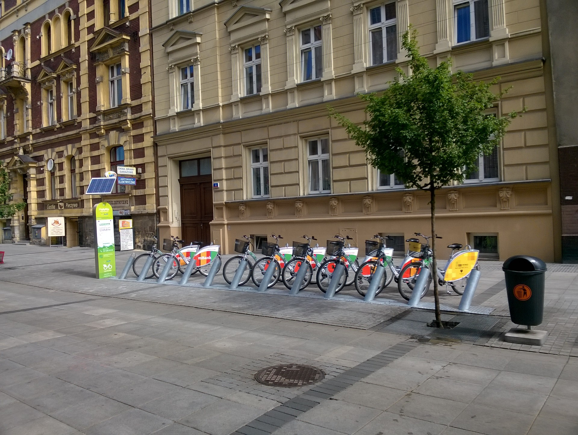 City by bike - stacja ul. Mariacka